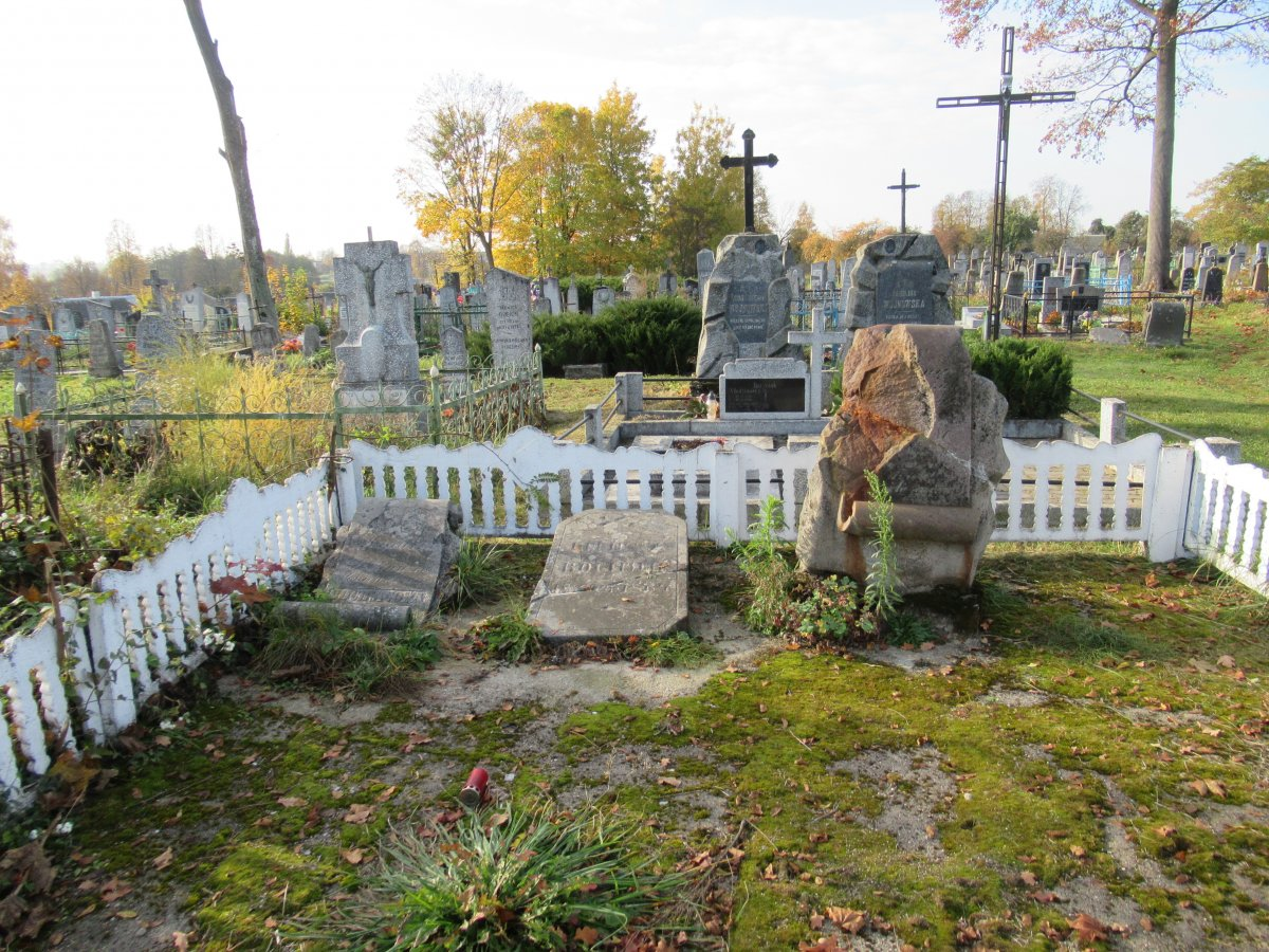 Дарава. Могілкі. Пахаванні Бохвіцаў